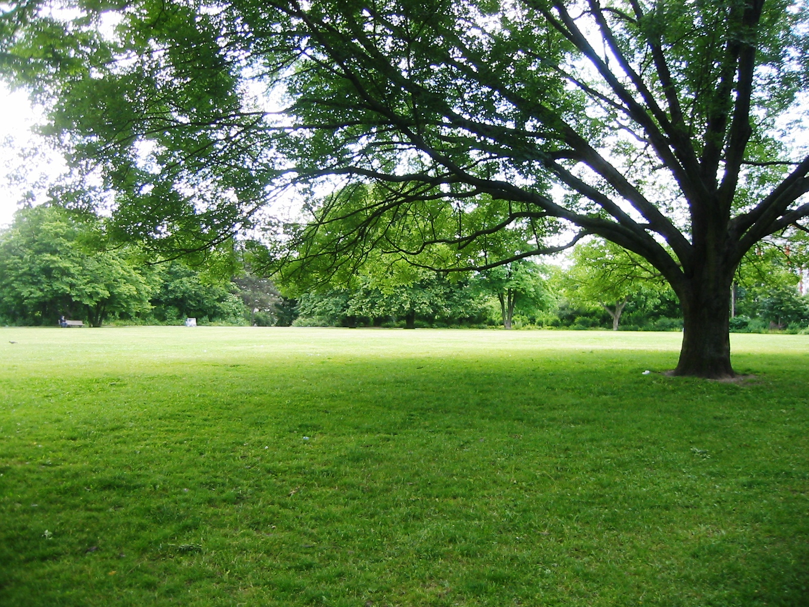 Thomashöhe in Berlin-Neukölln; Der ehemalige Neuköllner Rollberg wurde industriell abgebaut; nach dem Zweiten Weltkrieg wurde der Platz genutzt, um Trümmer der angrenzenden Häuser aufzuschütten.